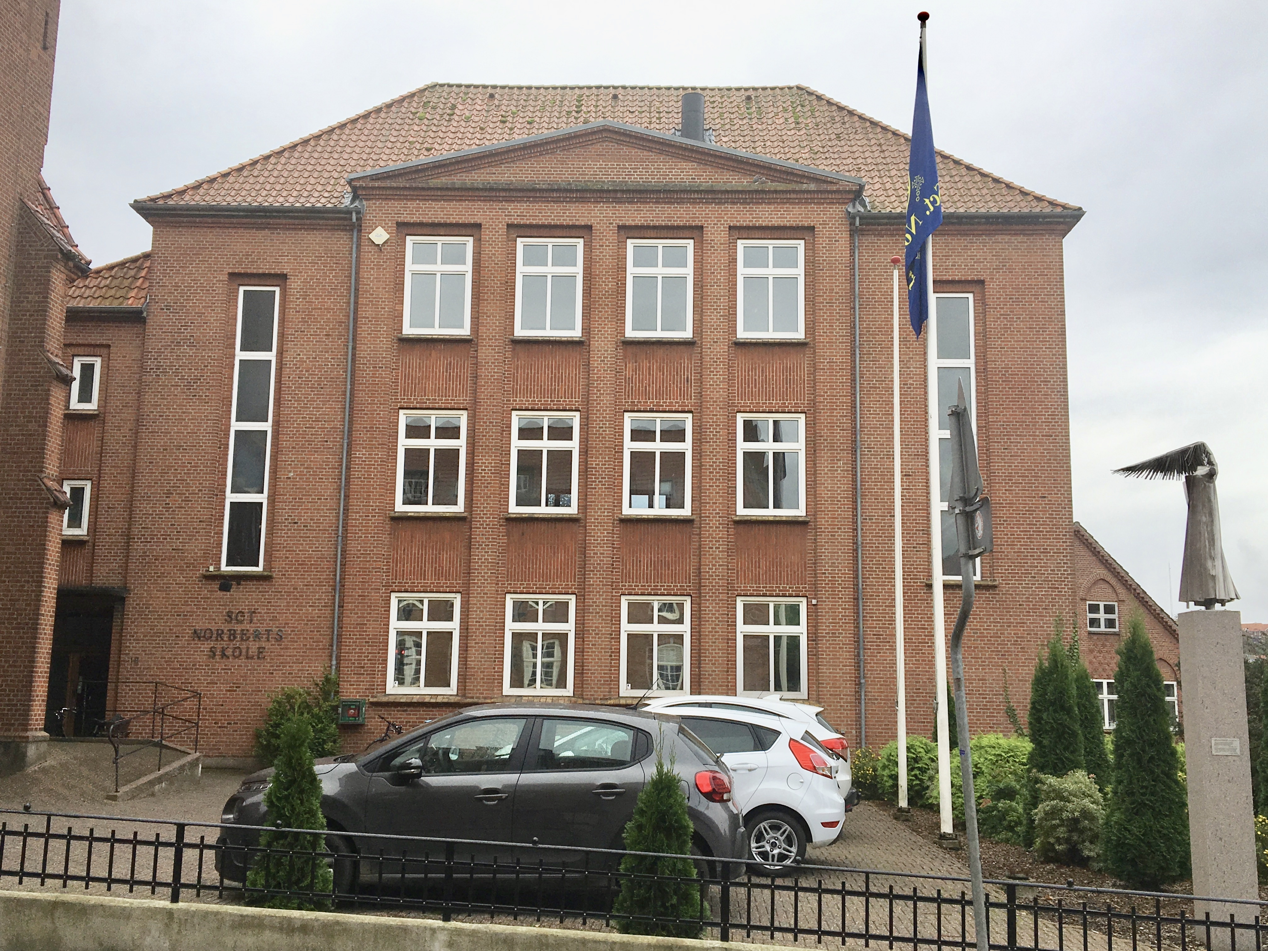 Sankt Norberts Skole i Vejle, den nordlige side, i 2019